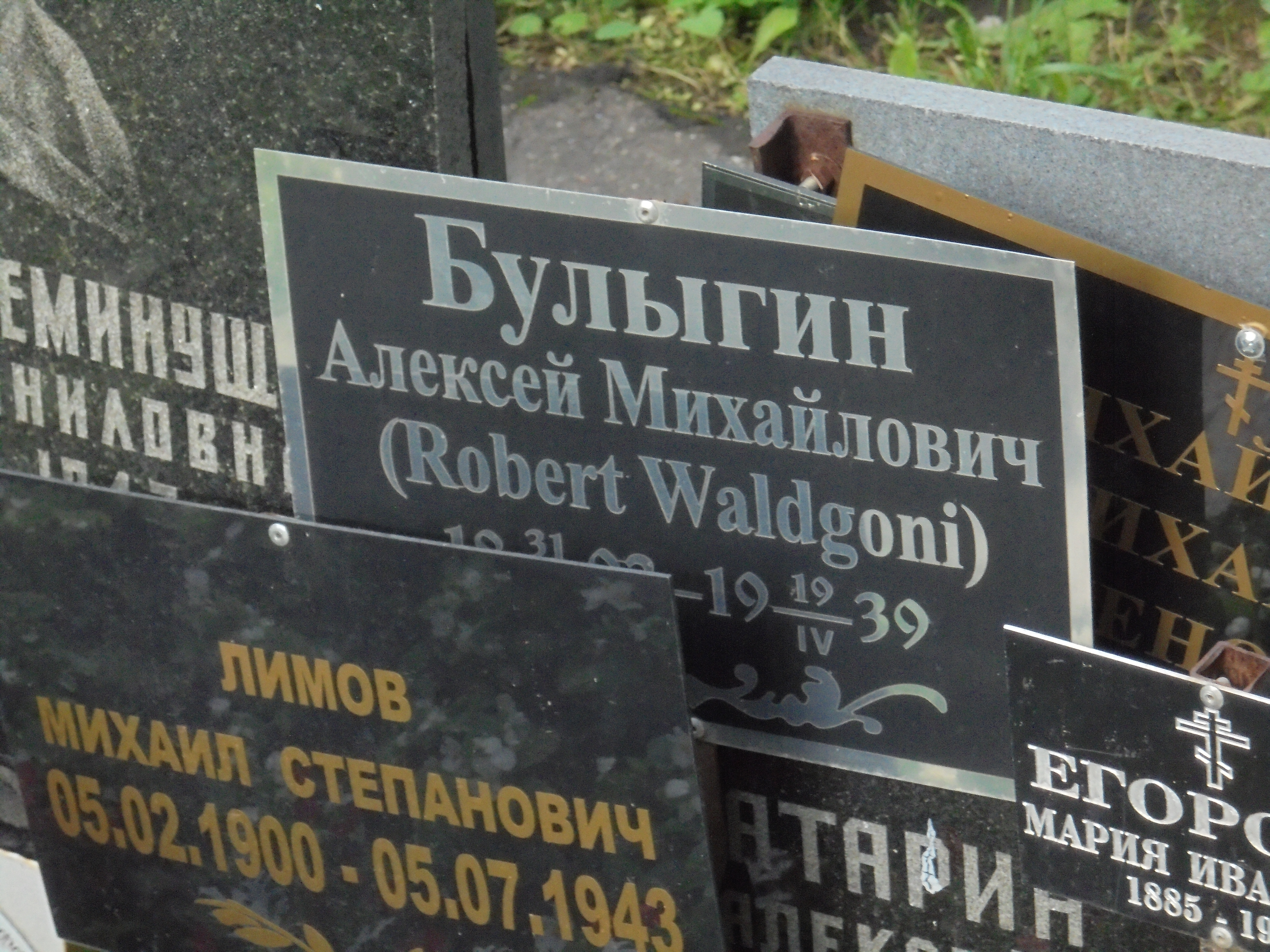 Srpskohrvatski / српскохрватски: Spomen-obeležje jugoslovenskom komunisti Robertu Valdgoniju na Donskom groblju u Moskvi, na mestu gde je njegov pepeo pohranjen zajedno sa ostacima preko 5,000 žrtava staljinskog terora.